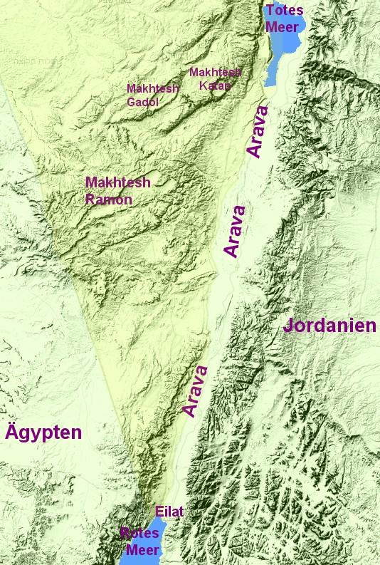 Übersichtskarte der Arava